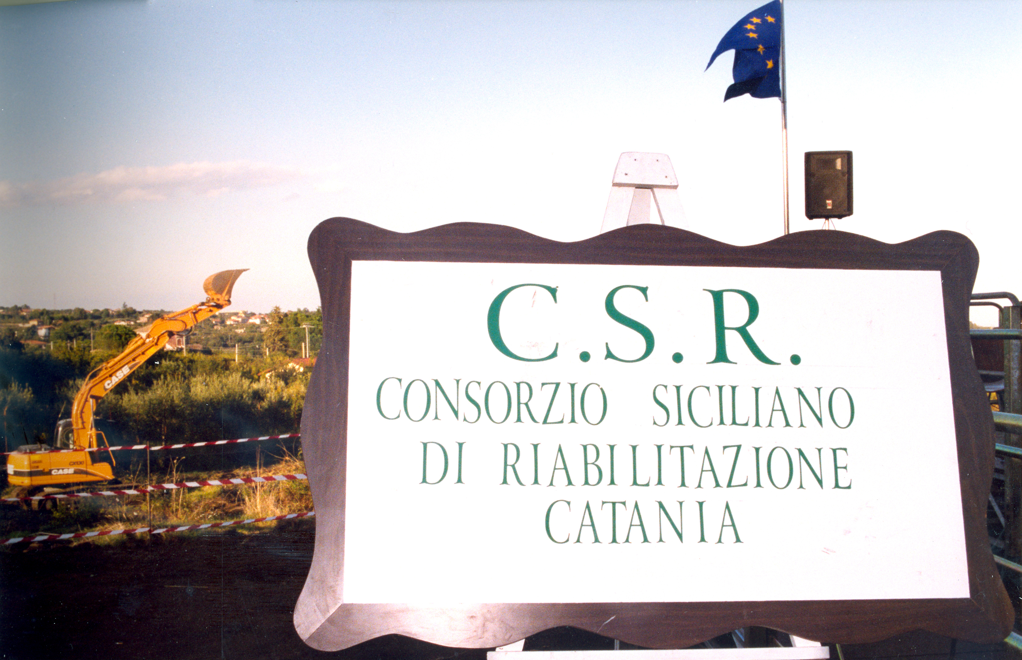 Una delle realizzazioni del CSR